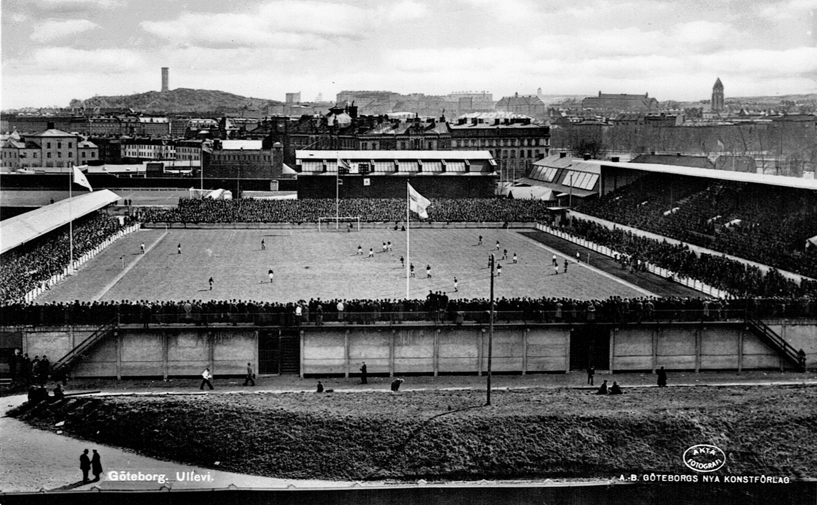 Gamla Ullevi (1916)